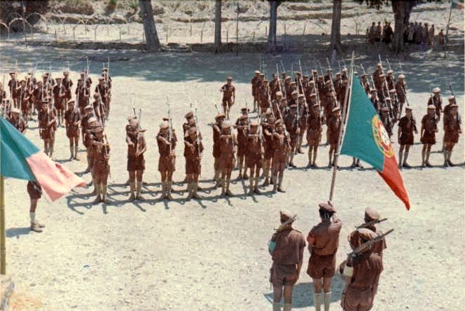 Juramento de Bandeira de Tropas de 2ª Linha